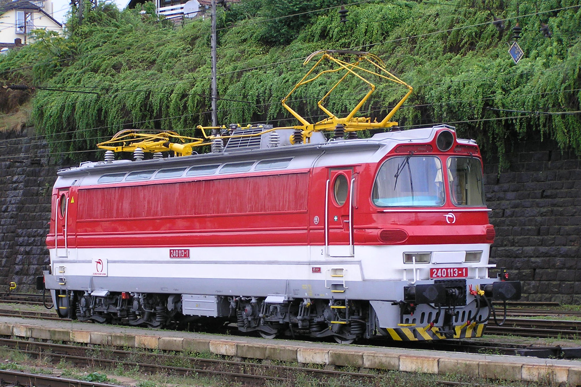 240 113-1 ZSSK, krátko po uvedení nového náteru Blonski, Bratislava hl. stanica, august 2006